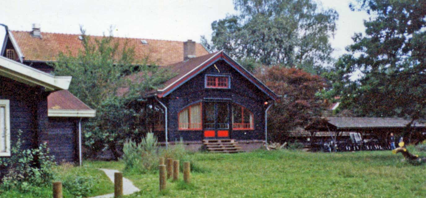 voormalig jachthuis, nu jeugdherberg De Kleine Haar te Gorssel